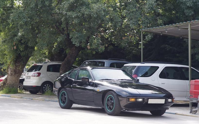 Porsche 924 Spirit